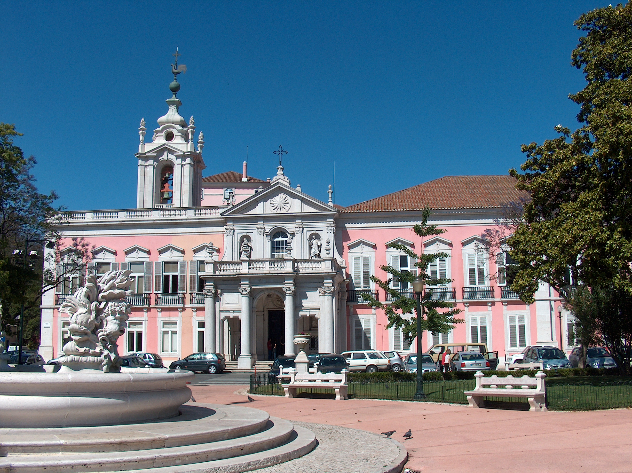 Palácio das Necessidades. Palácio oitocentista, Lisboa, Portugal.